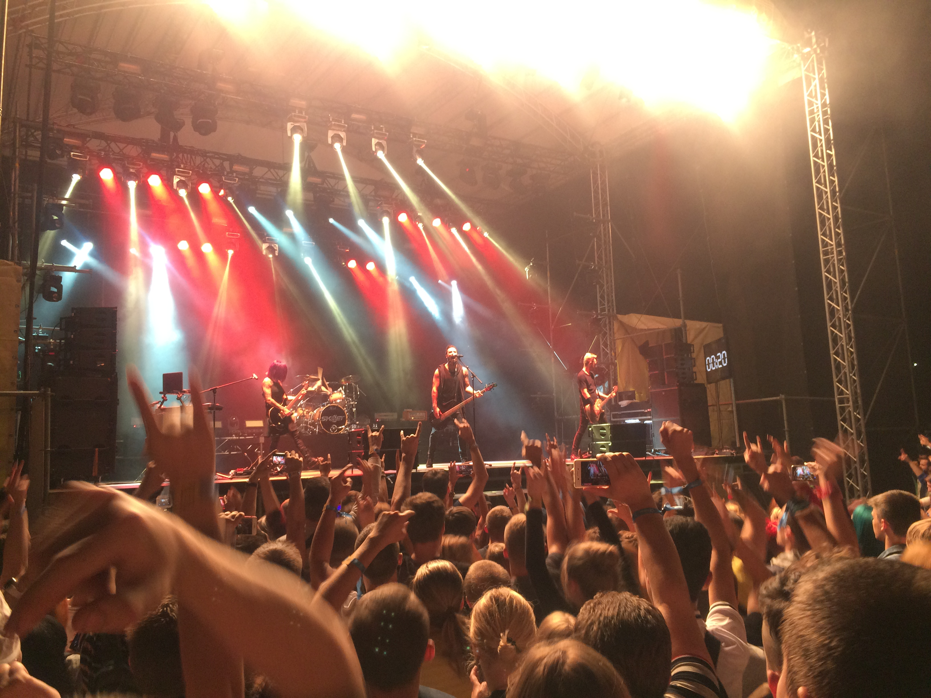 Фестиваль Atlas Weekend 2018. Виступ Skillet